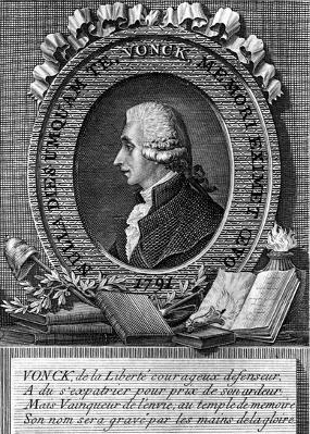 Texte: Vonck, de la Liberté, courageux défenseur. A du s'expatrier pour prix de son ardeur. Mais Vainqueur de l'envie; au temple de mémoire. Son nom sera gravé par les mains de la gloire.